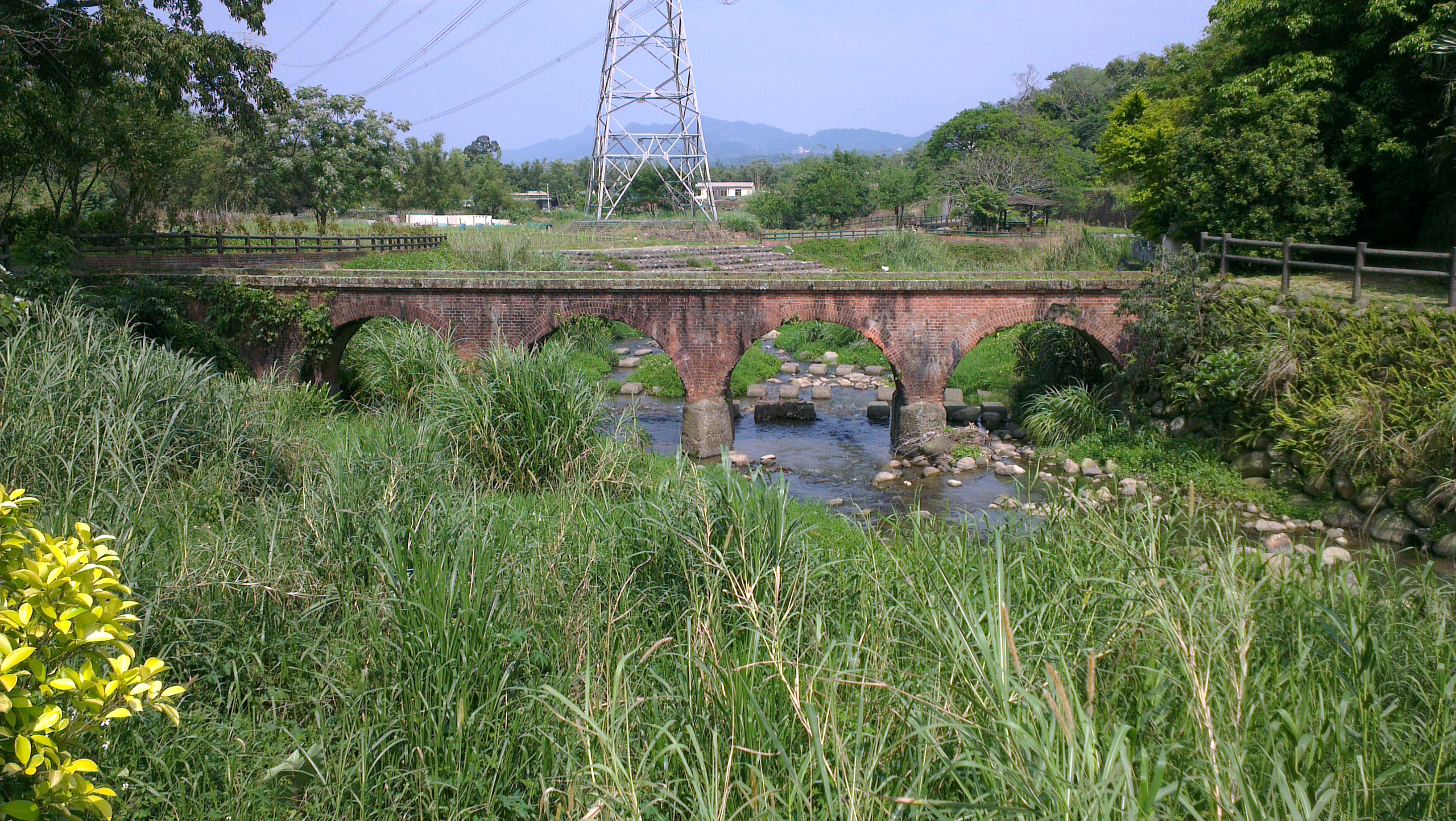 中文（台灣）: 紅橋（舊名大平橋）